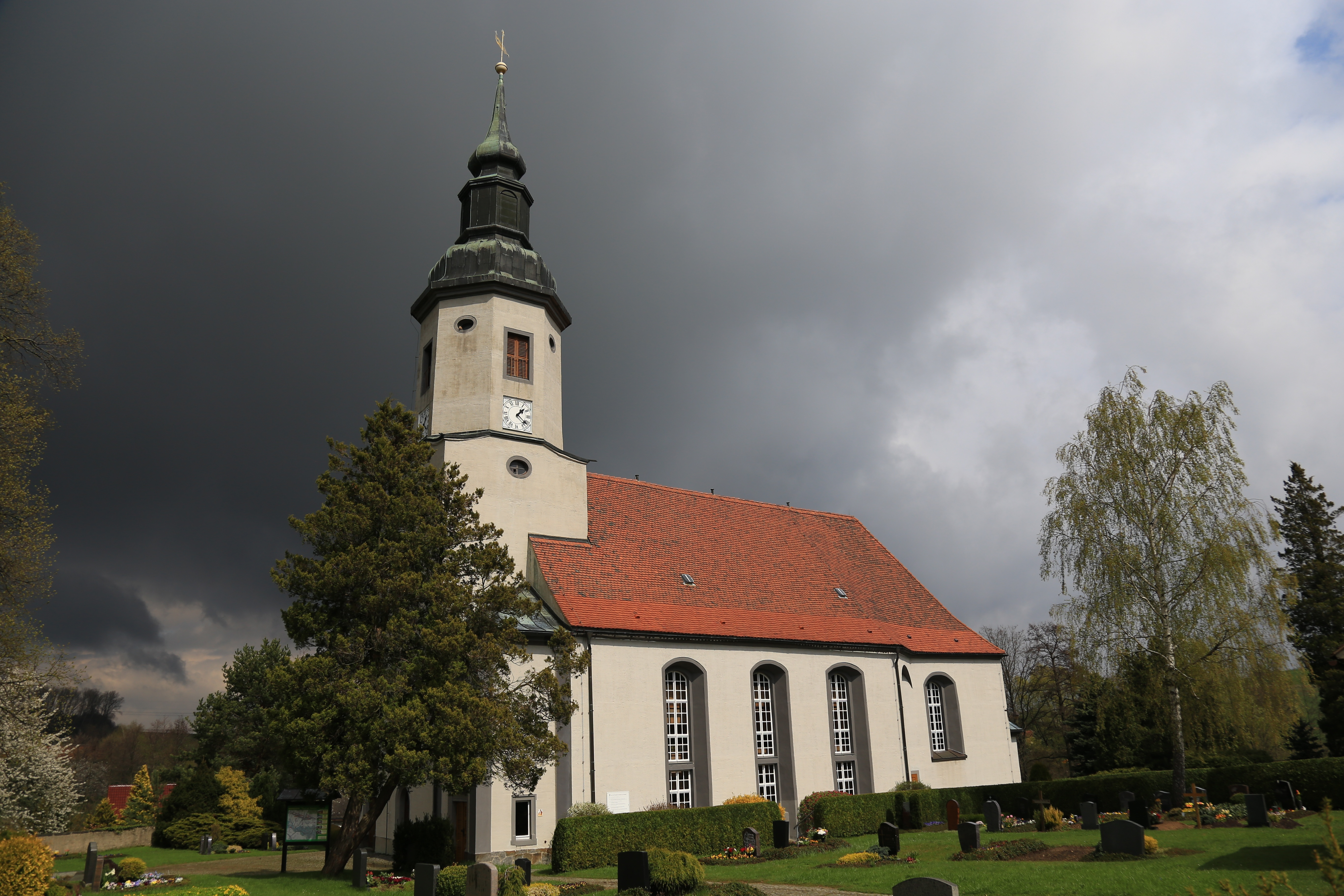 Marienkirche Putzkau April 2017 (1)